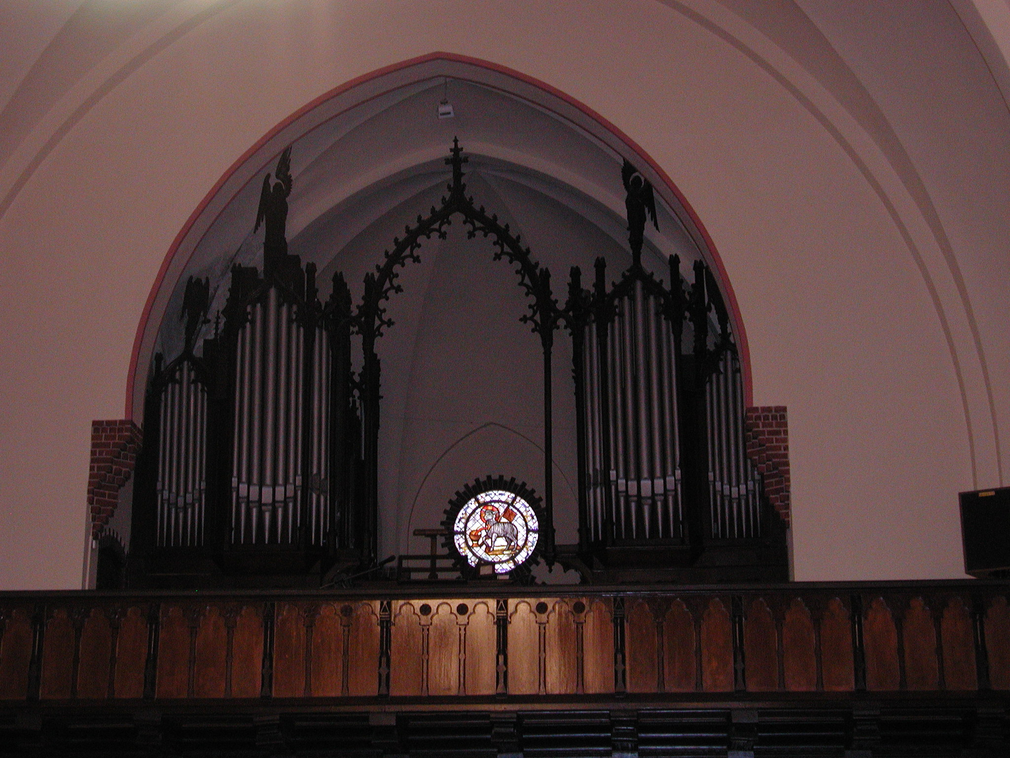 Innenansicht der Mauritiuskirche: Orgelempore und "Lamm"-Fenster